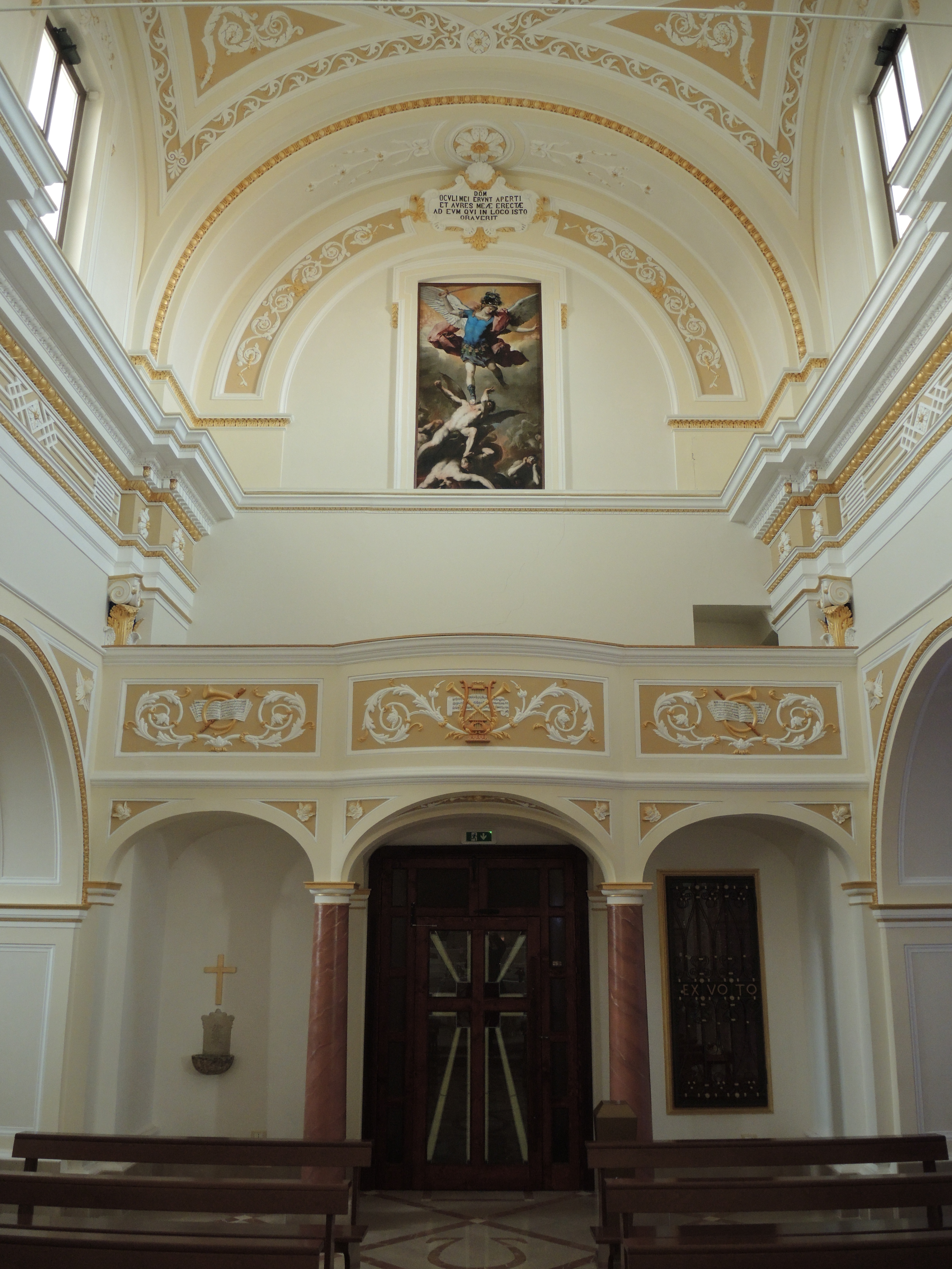 Archi: Santuario di San Rocco